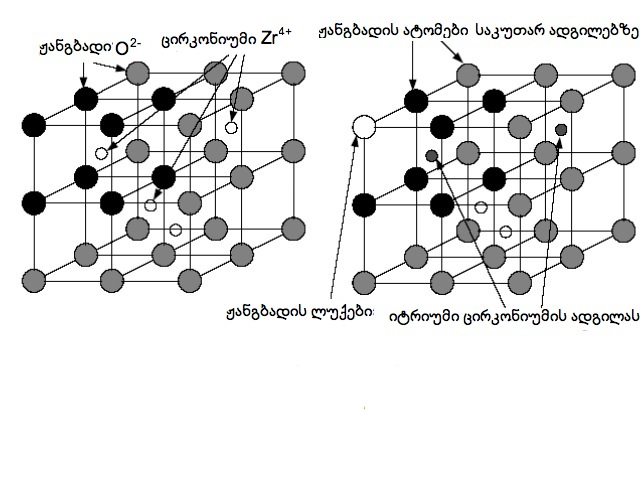 ZrO2/Y2O3-კრისტალის სტრუქტურა რადგანაც ცირკონიუმი სუფთა ფორმაში ცუთი გამტარია იონებისათვის და ასევე მეანიკურად არა საკმარისად მდგრადია, უკეთდება მას იტრიუმის დანამატი.